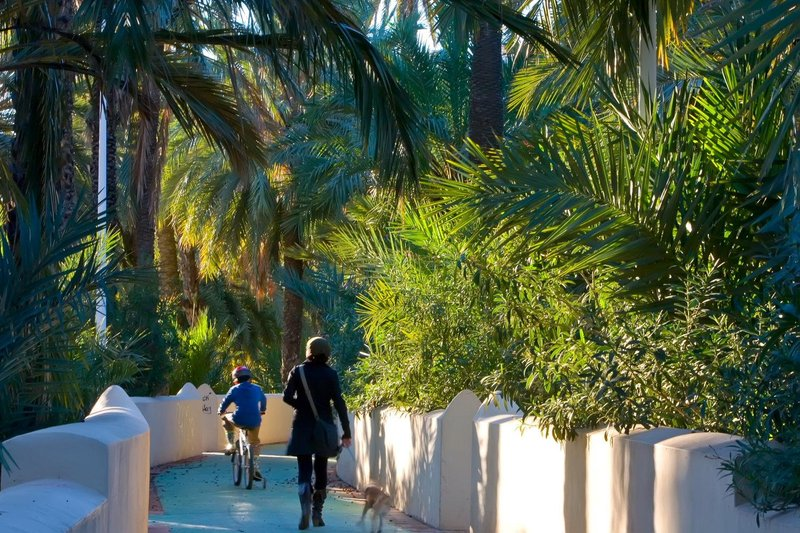 La Ruta del Palmeral de Elche.